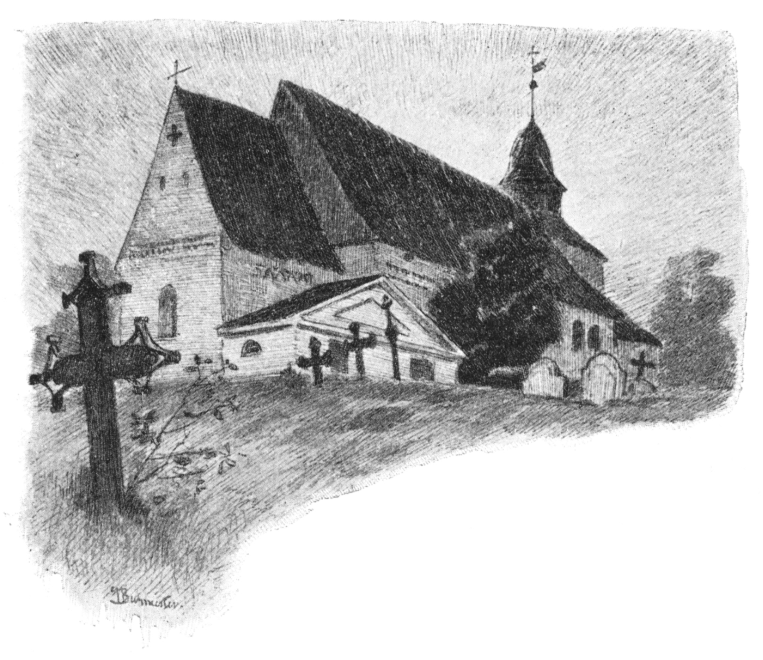 Die Kirche St.Georg ist die älteste im Lauenburger Land. Sie wurde ca. 1044. 1060 wurde die Feldsteinkirche Bischofskirche. Mit der Errichtung des Ratzeburger Domes verlor die Kirche nach 1170 an Bedeutung, bis 1230 wurden die zwölf Kirchengemeinden ausgepfarrt. 1561 wurde sie durch einen Brand schwer beschädigt und wieder wiederaufgebaut. 1569 wurde eine neue Glocke Installatiert , die bis heute noch bei Taufen läutet.